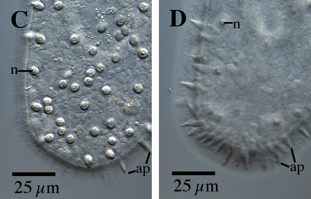 M. marisrubri C: Extremo posterior enfocando los nematocistos (n). D: Extremo posterior enfocando las papilas adhesivas (ap). Microfotografía.